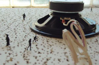 transakustik modell